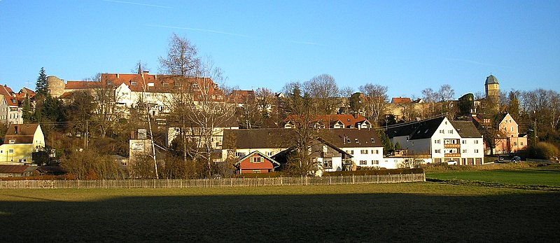 Stadtbefestigung Friedberg (Landkreis Aichach-Friedberg, Bayerisch-Schwaben). Westseite, Südlicher Teil. Eigene Aufnahme, Jan. 2007 / Friedberg city walls (Bavaria, Germany). View from the west, southern part. Own photo, Jan. 2007